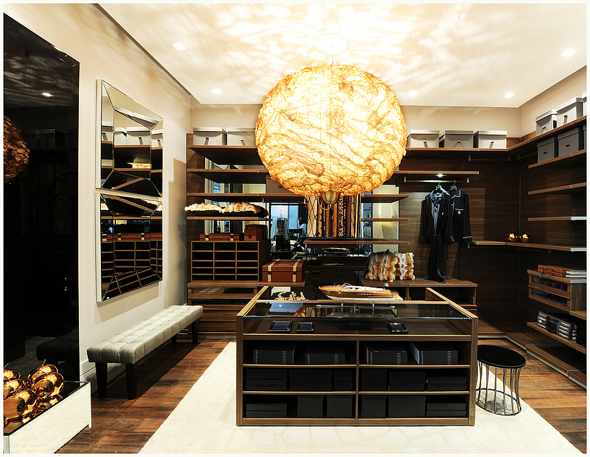 Showroom